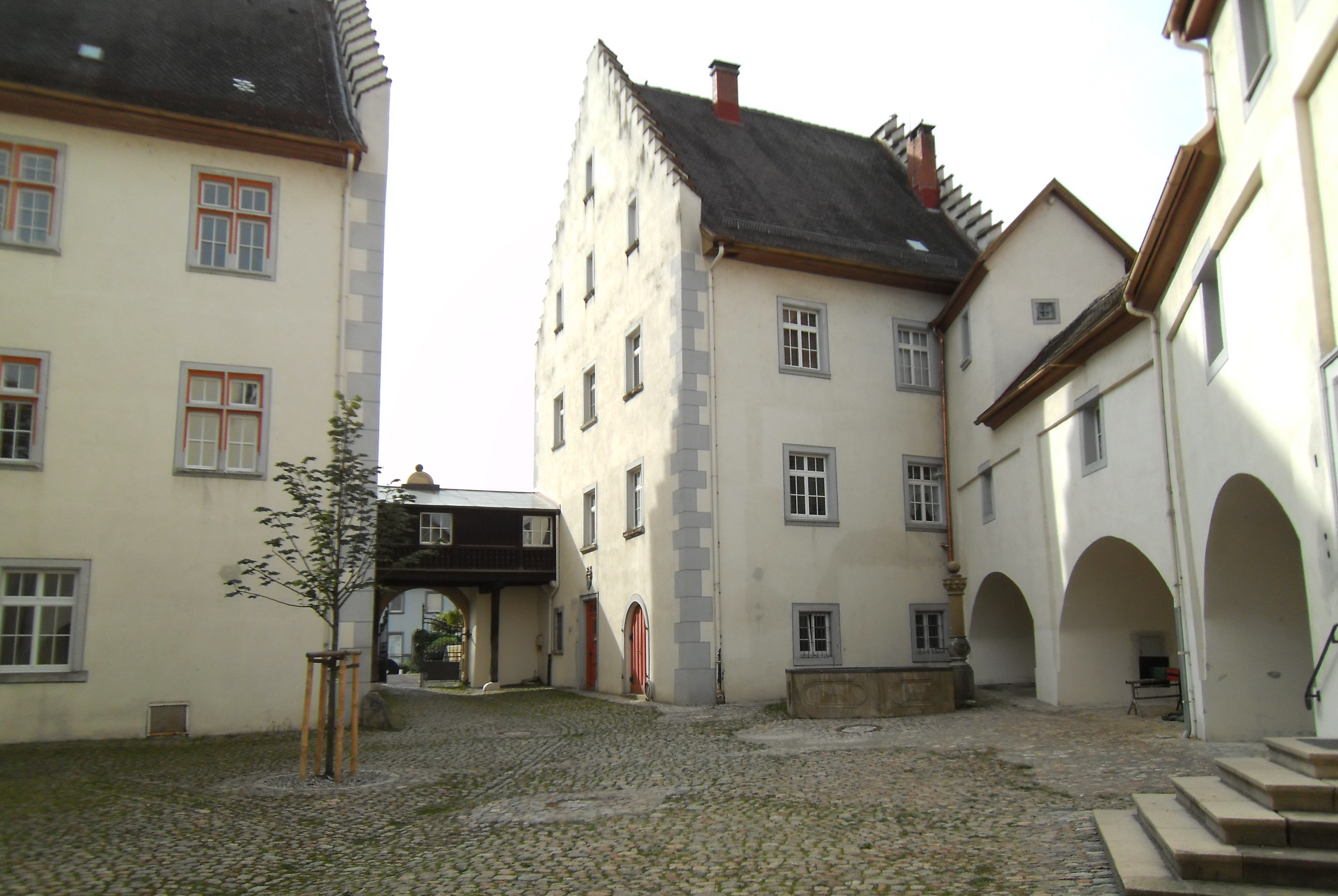 Schloss Tiengen, Blick zum Eingangstor vom Schlosshof, rechts der "alte Bau" links das "Neue Schloss"